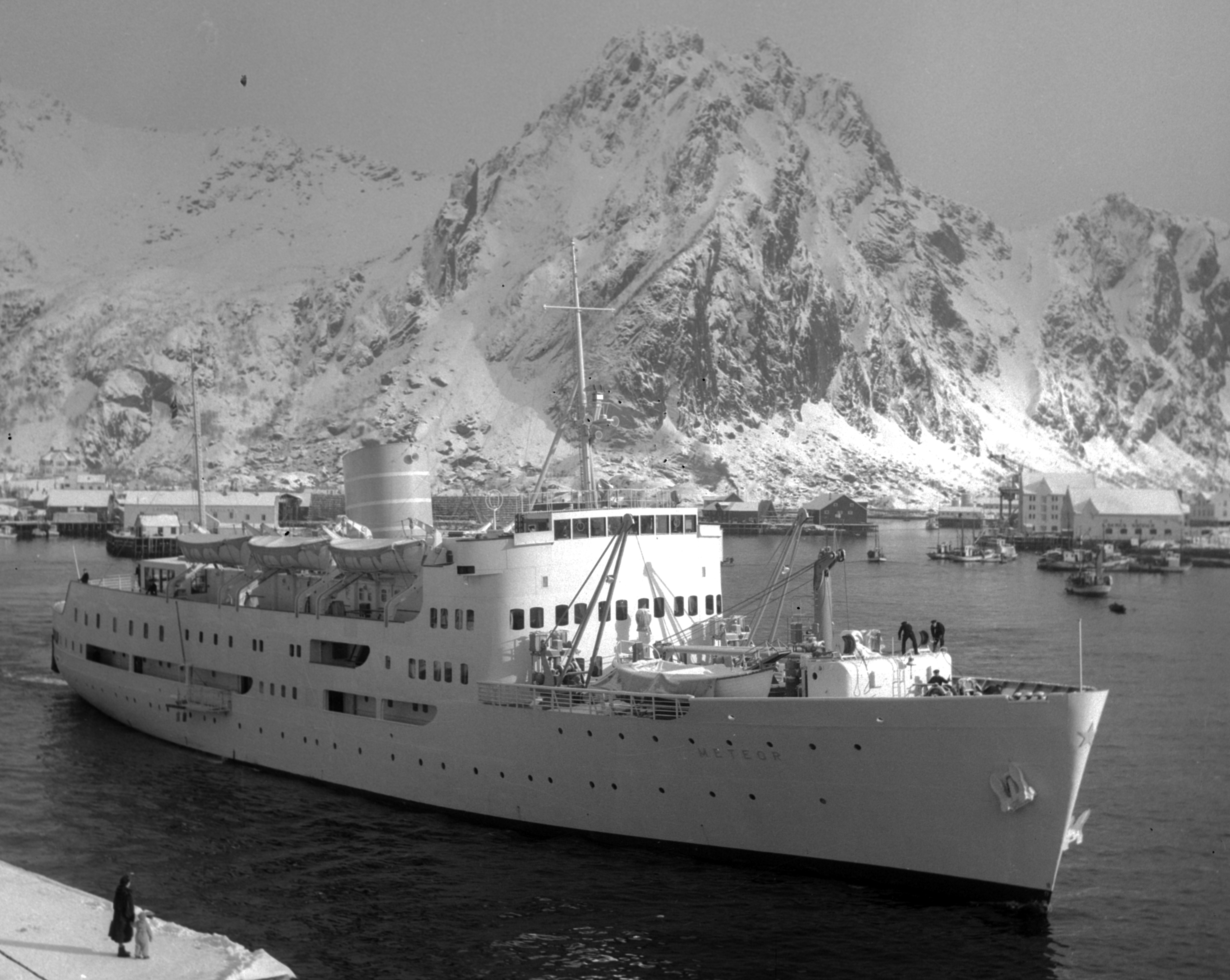 Bildet er hentet fra Nordlandsmuseet bildesamling etter Kanstad. Motivbeskrivelse: M/S "Meteor", Svolvær Sted: Svolvær Nøkkelord: Stedsnavn Båter og fartøyer Båter og farkoster, små Motorskip Kystfart Skipsmannskapet